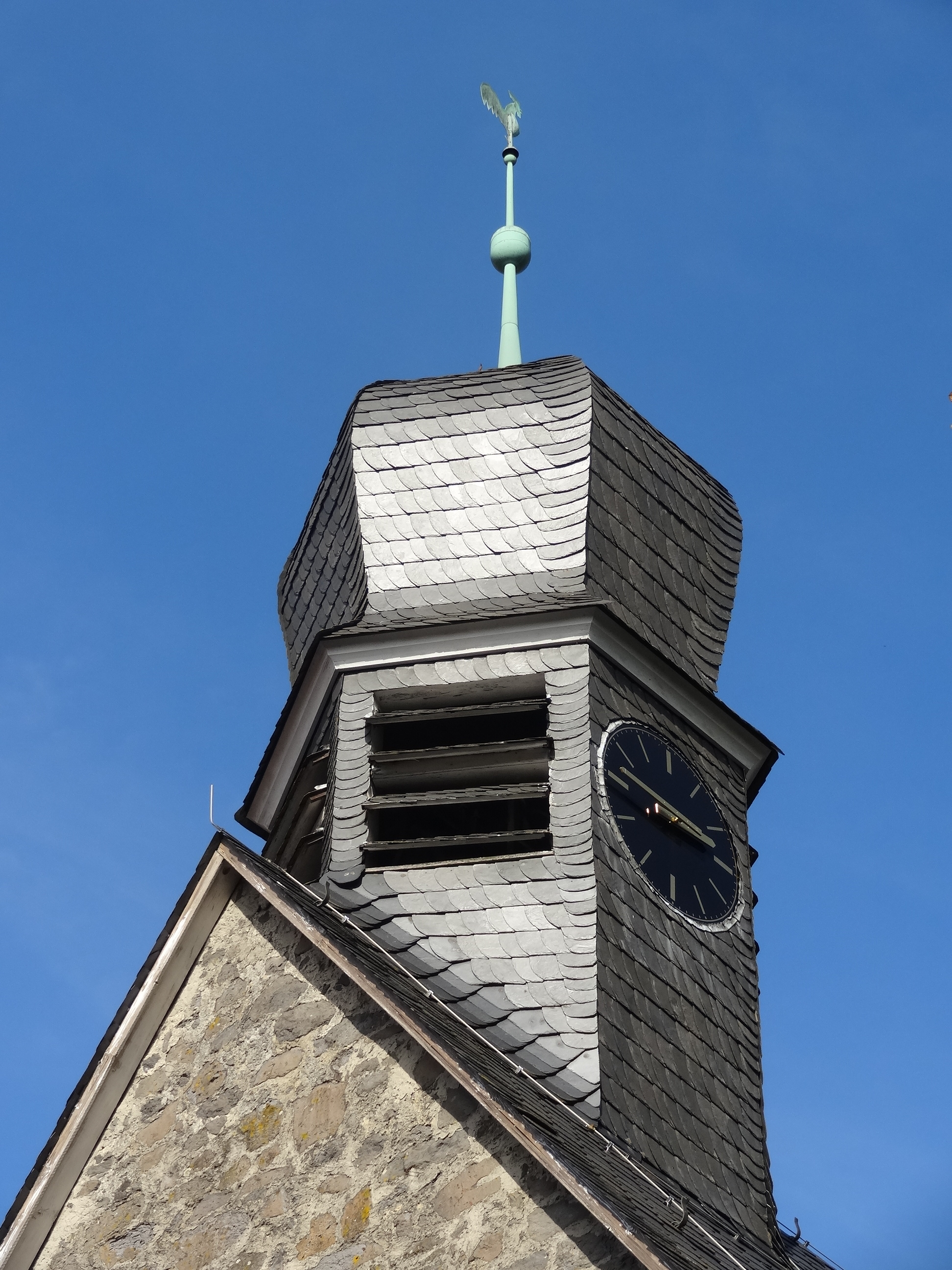 Evangelische Kirche Weickartshain